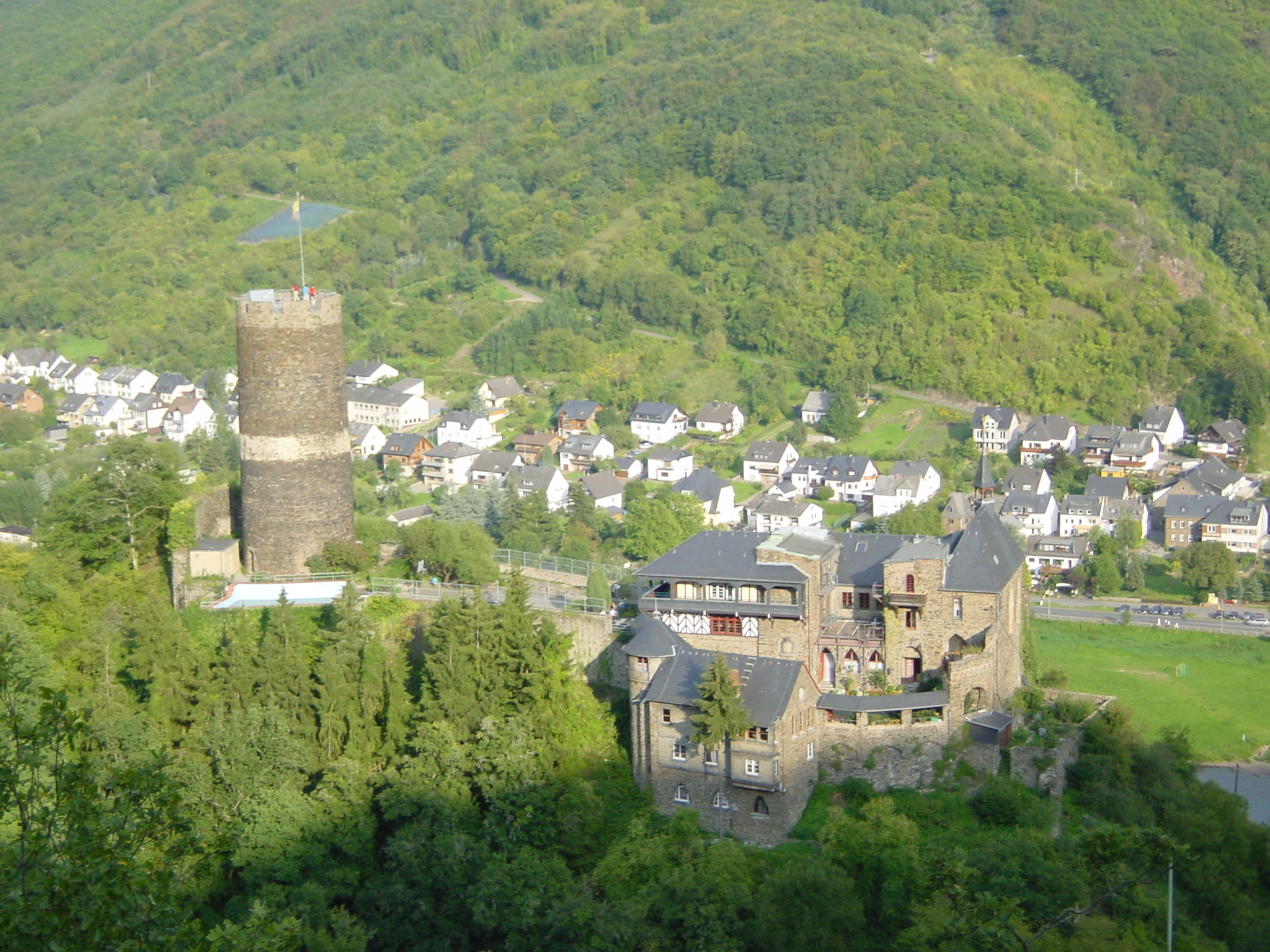 Burg Bischofstein (Hintergrund: Burgen), Hatzenport Mosel